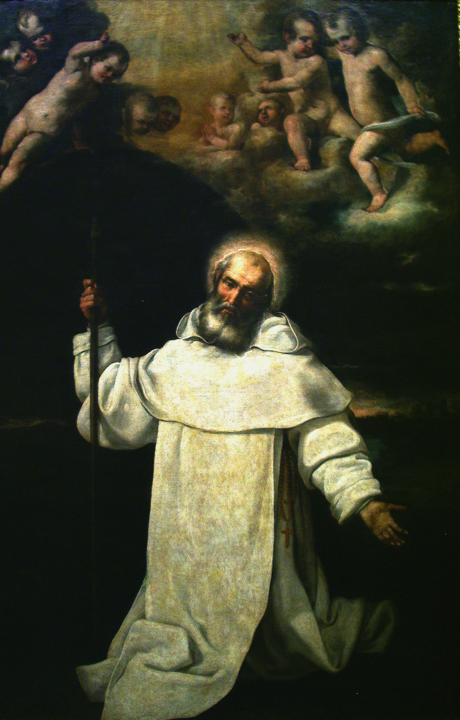 La obra representa a San Pedro Nolasco (1180-1245).